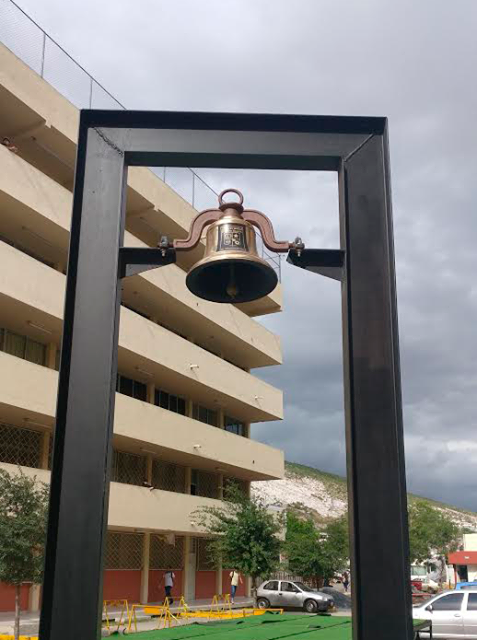 Campana "La Libertad" UNEZ